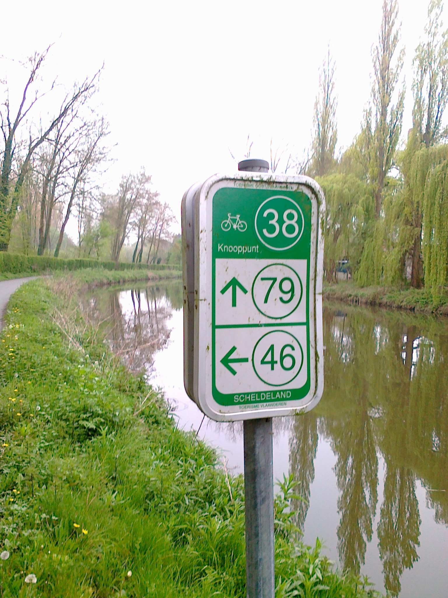 Knooppunt 38 van de fietsroute "Denderende Steden" in Aalst en Erembodegem, op dit knooppunt loopt lus 1 verder over route 46 en lus 2 over route 79